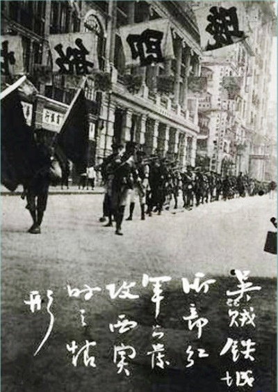 商团事变铁军入城